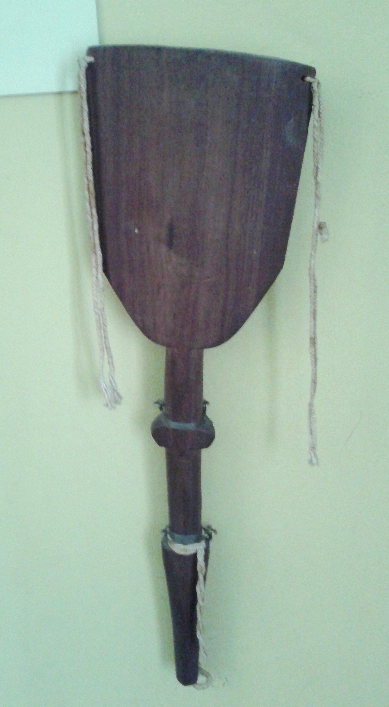 Português do Brasil: Borduna - Índios Uapixana, 1924. Acervo de etnologia indígena brasileira do Museu Nacional/UFRJ, Rio de Janeiro, Brasil.